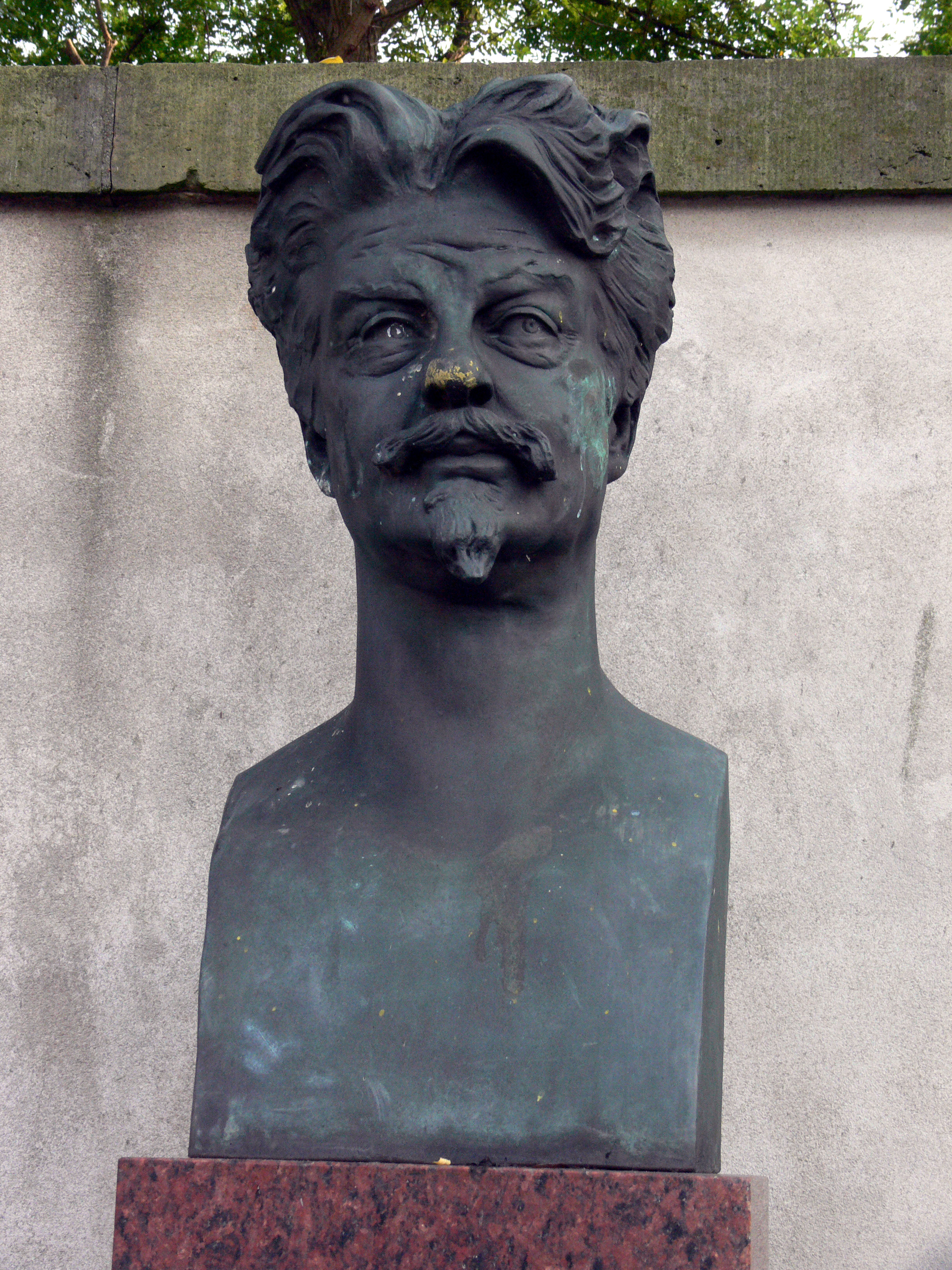 Skulptur von Georg Brandes in Kopenhagen, gefertigt von Max Klinger. Georg Brandes stammte aus Kopenhagen und avancierte aufgrund seiner literaturkritischen und publizistischen Arbeiten zu einem anerkannten Intellektuellen und Kulturvermittler des ausgehenden 19. und beginnenden 20. Jahrhunderts. Er galt Nietzsche als Exempel des "guten Europäers" und vielen anderen Zeitgenossen als "Anreger, Kritiker und Vermittler" der europäischen Kultur".